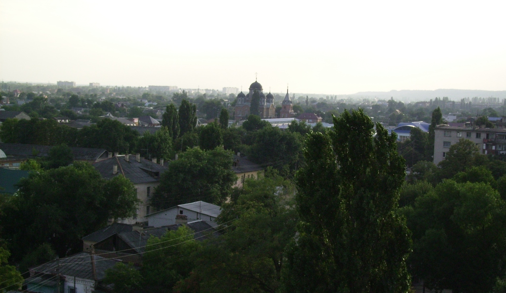 Вид южной части Кропоткина с колеса обозрения в городском парке.